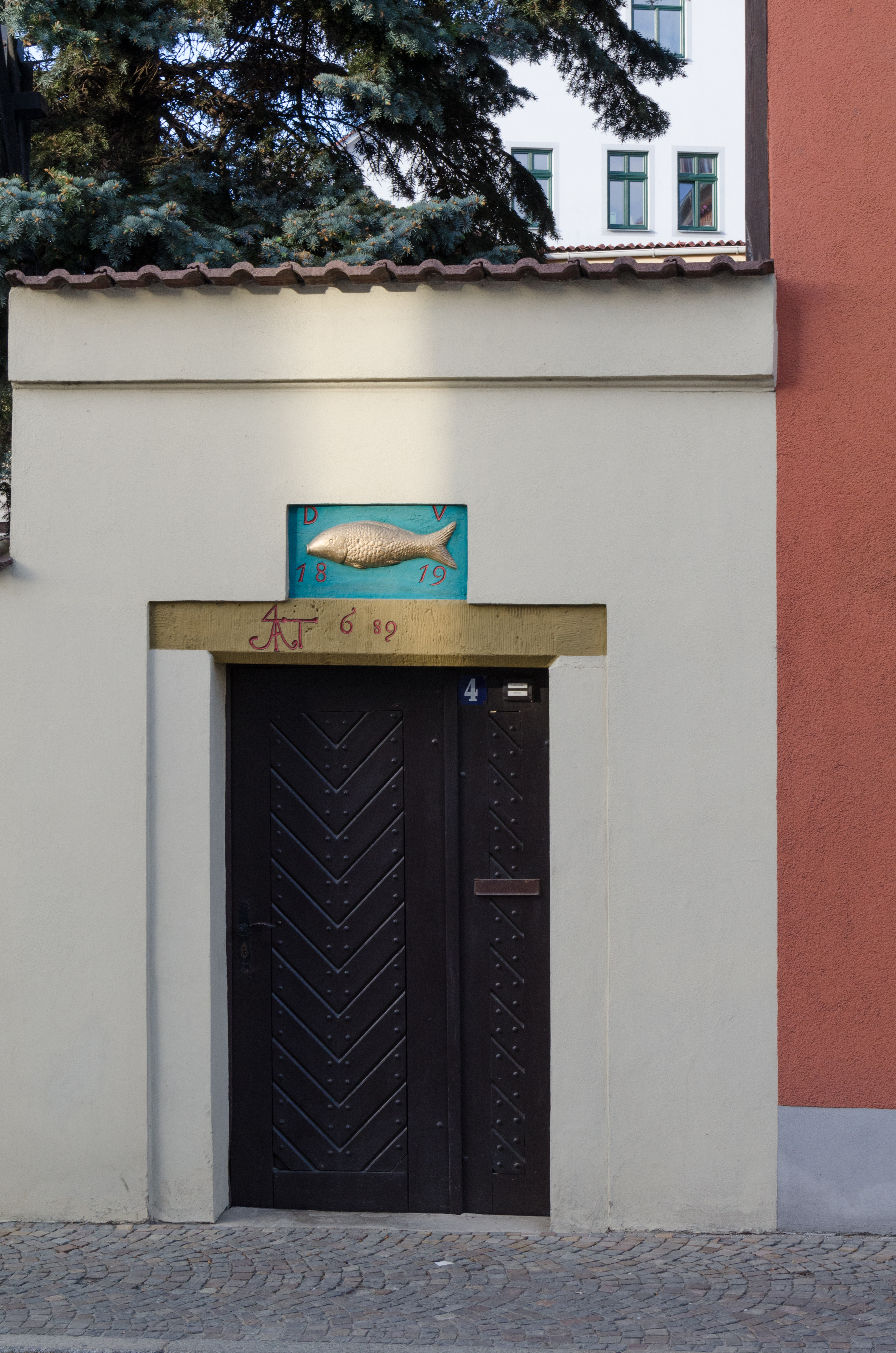 Naumburg, Freyburger Straße 4